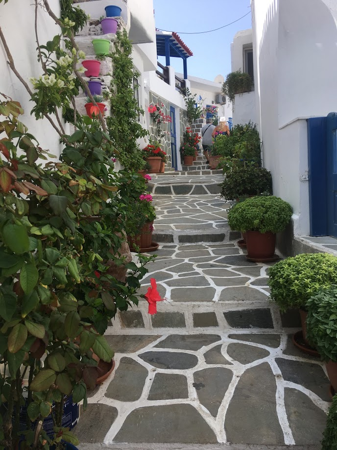 Χαρακτηριστικό δρομάκι από τις Δρυοπίδες της Κύθνου